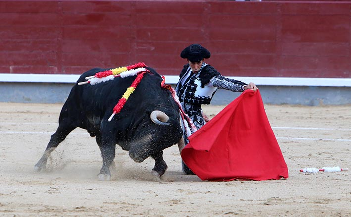 Natural de rodillas de Fortes con la montera puesta en la plaza de toros de Las Ventas